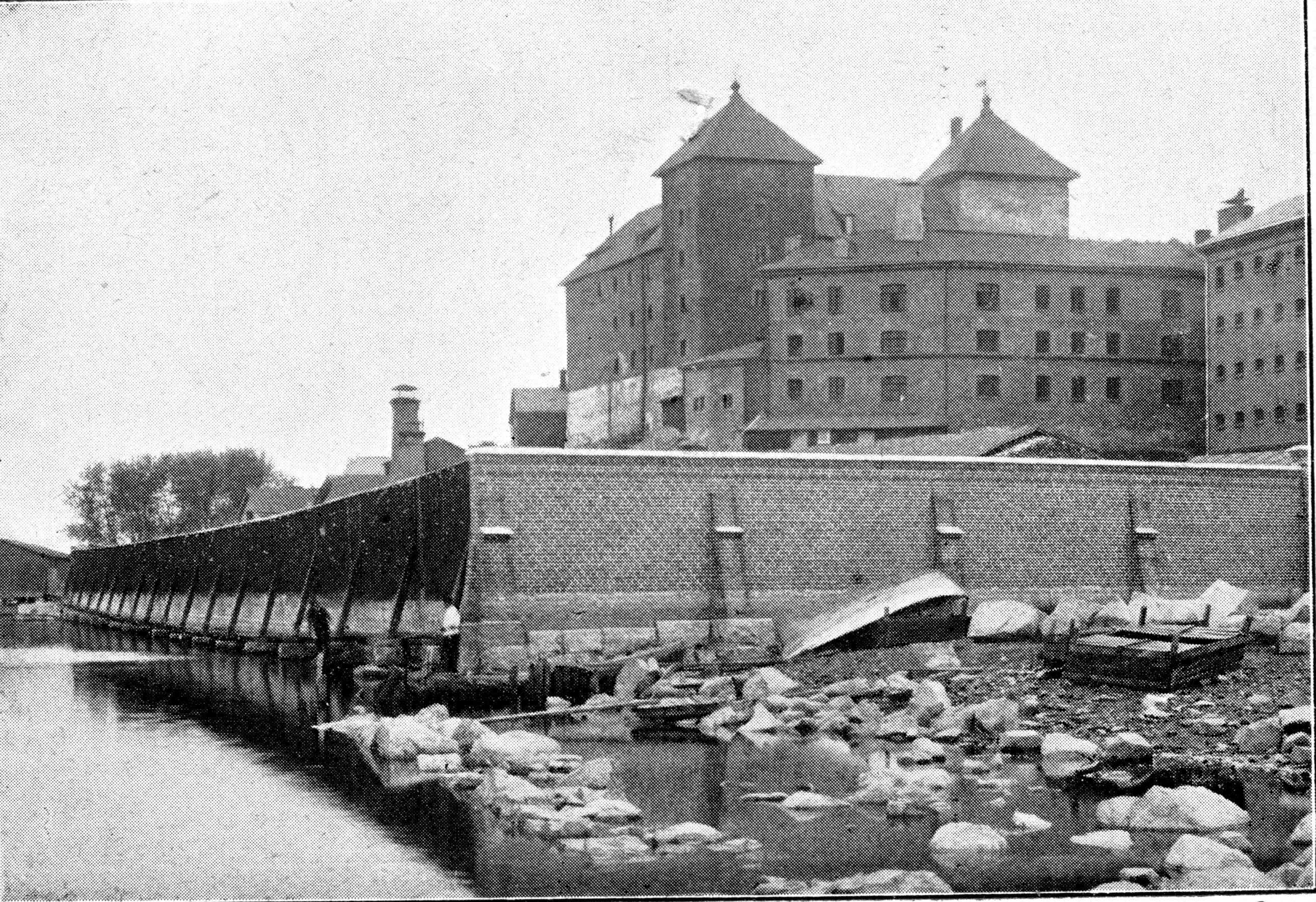 Julius Alio (19.07.1872 – 4.03.1933) books "Hämeen linnan esi- ja rakennushistoria I" 1917.